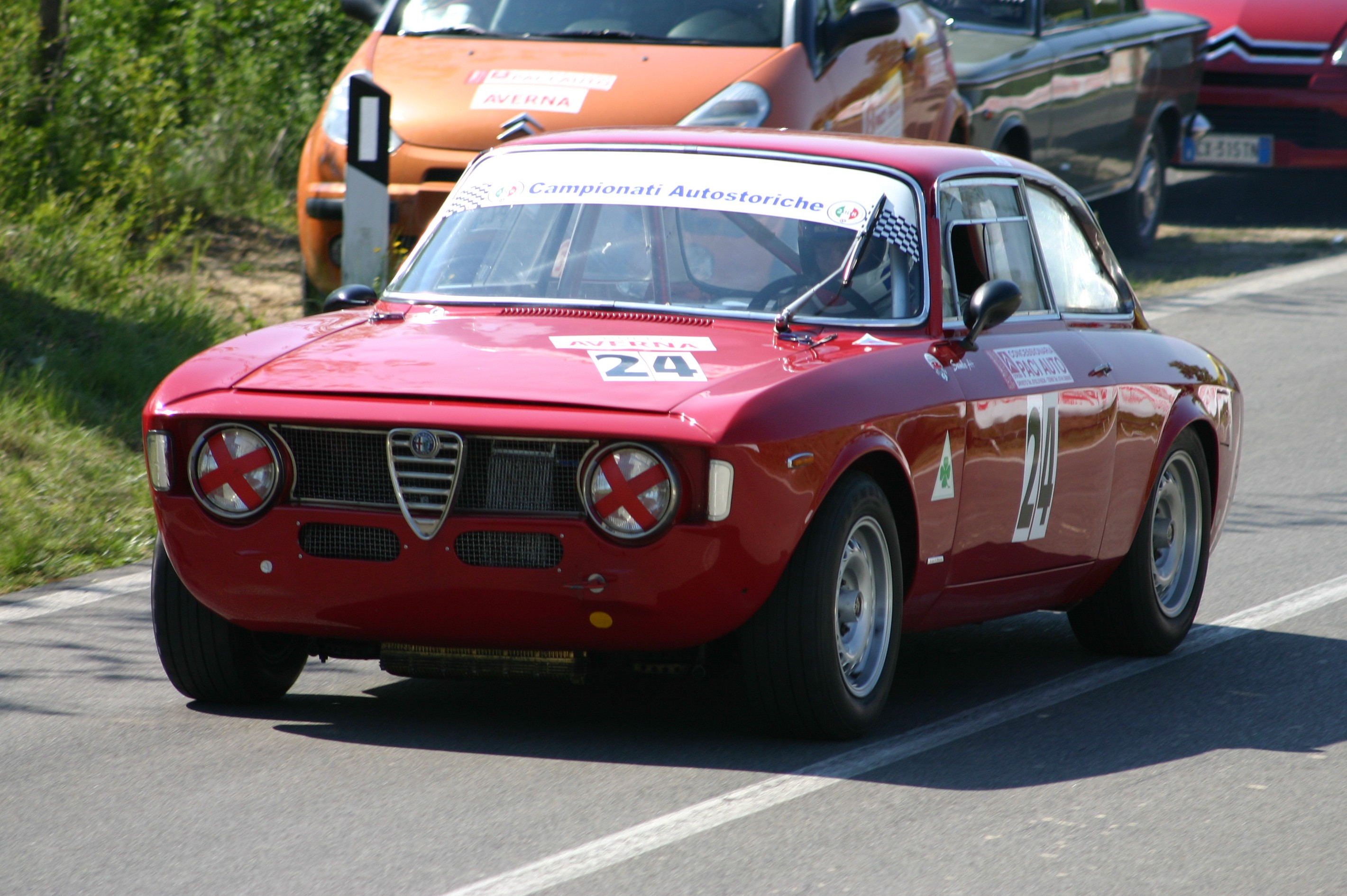 Una GTA 1600 durante una competizione per autostoriche. Foto scattata da me il 27.4.10 durante la Cronoscalata della Castellana (Orvieto).